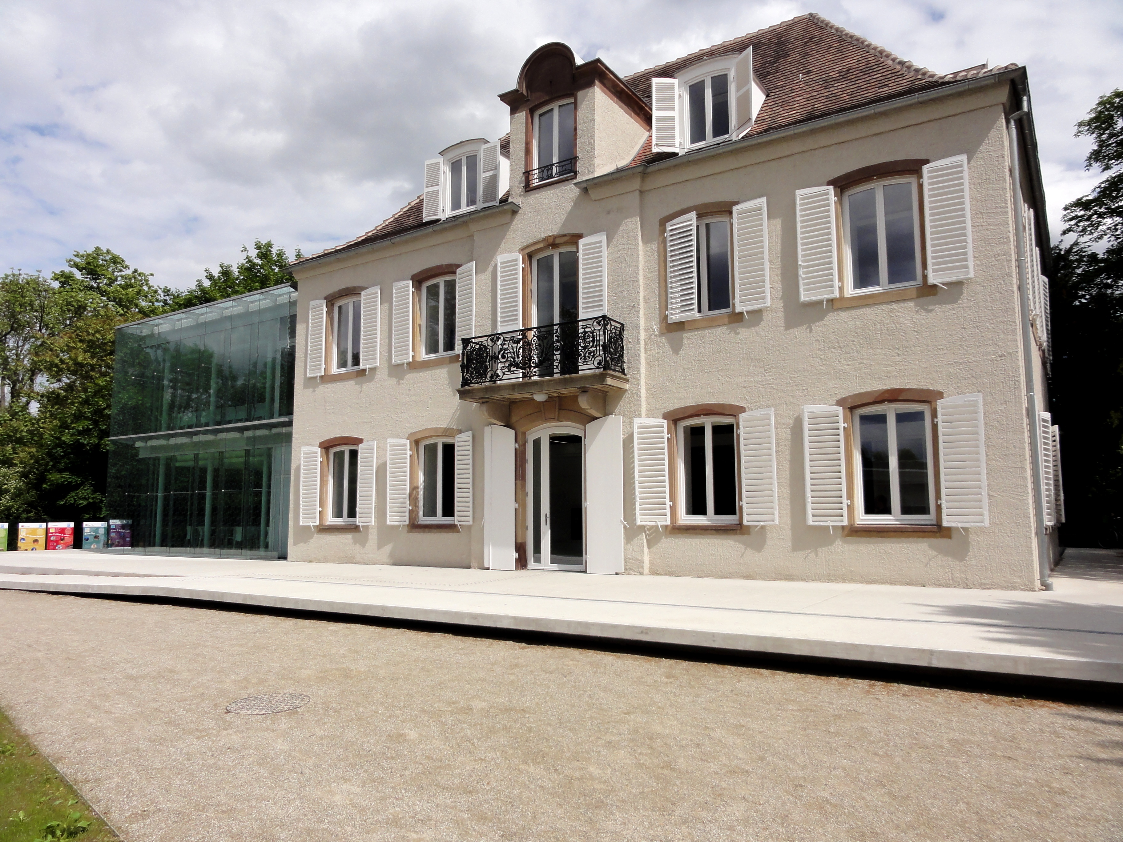 Alsace, Bas-Rhin, Strasbourg-Robertsau, Villa "Kaysersguet" (XIXe), "Lieu d’Europe", 1a allée Kastner.